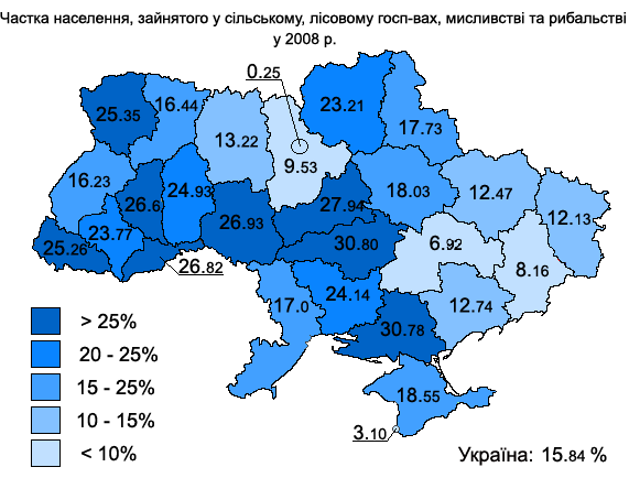 Зайнятість населення України у сільському та лісовому господарстві за даними 2008 року